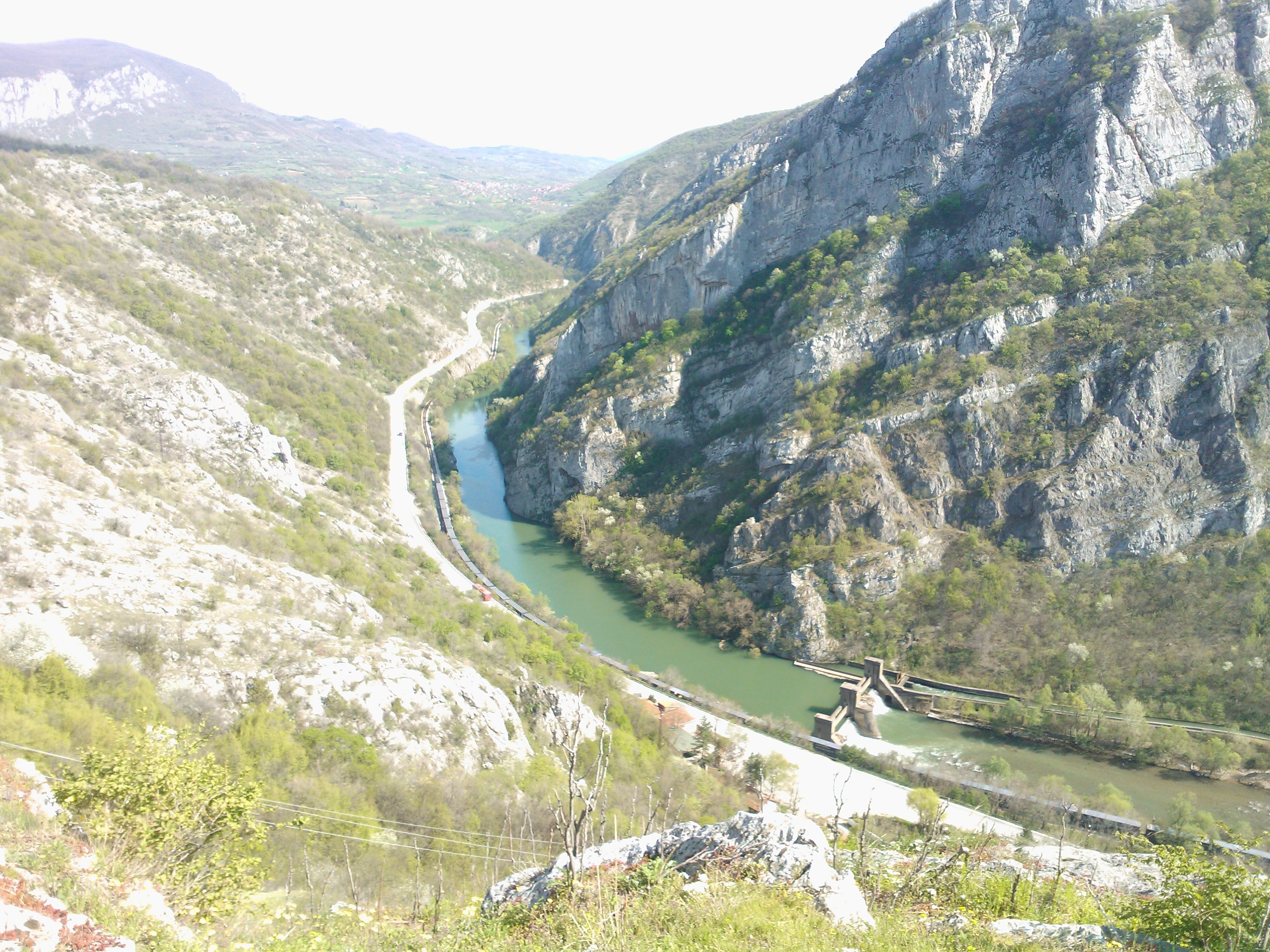 Ово је фотографија заштићеног природног добра у Србији под шифром: ПП17 This is a a photo of a natural area in Serbia with ID: ПП17 Парк природе Сићевачка клисура